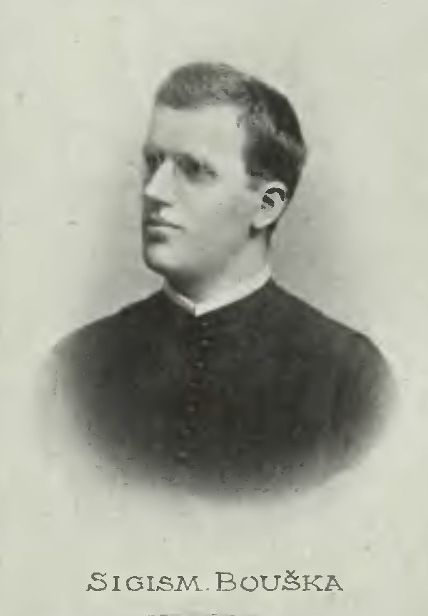 Portrét – Sigismund Ludvík Bouška (1867-1942), Český kněz, řeholník řádu benediktinů a básník.